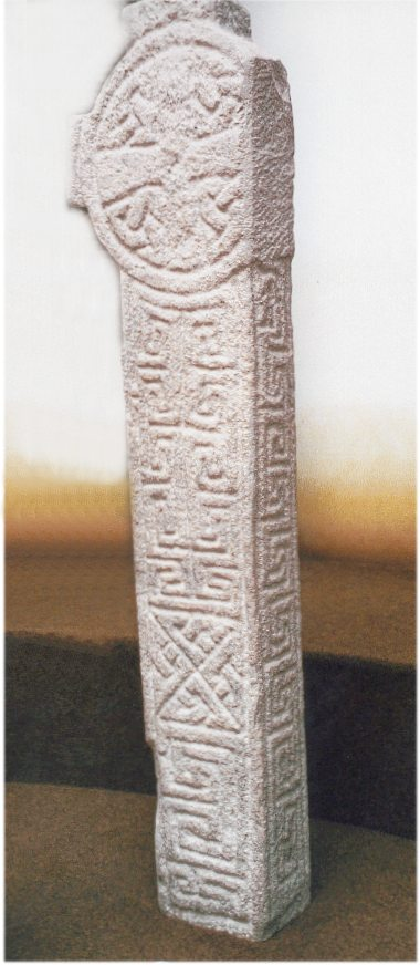 Croes Penmon.